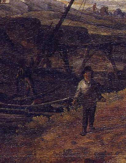 Hoogveenontginning waarschijnlijk in de omgeving van Wildervank (detail)